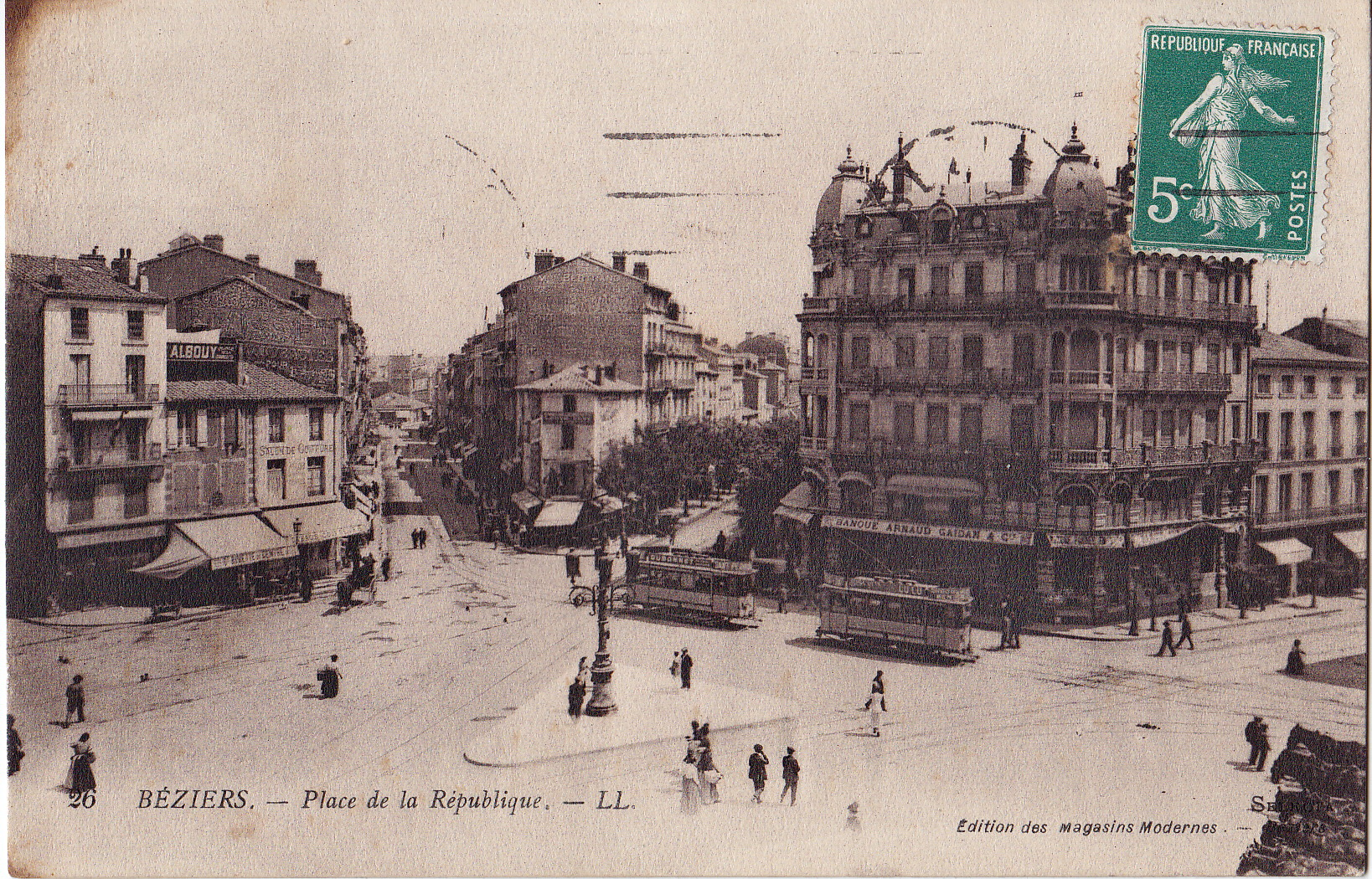 Carte postale éditée par les Magasins Modernes, n°26 :BEZIERS - Place de la République